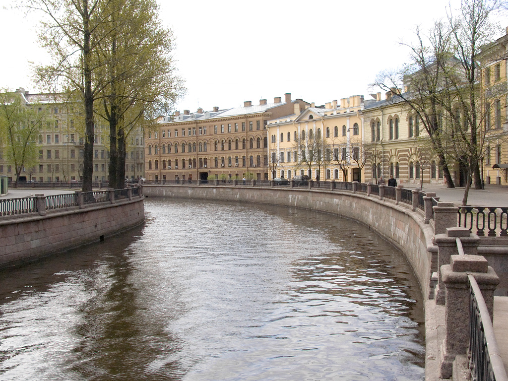 Gribojedovin kanavaa Leijonasillan luona.